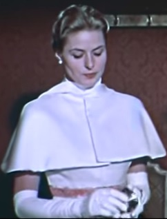 1956年の映画「追想」におけるイングリット・バーグマン